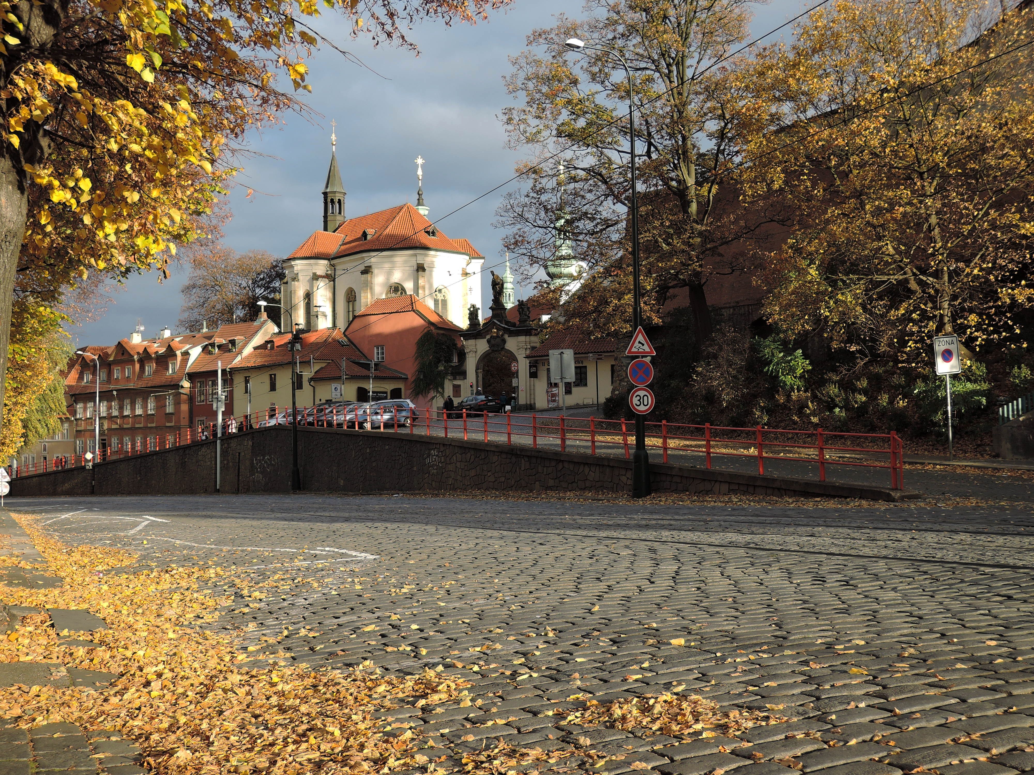 Praha, Hradčany, ulice Dlabačov, v pozadí kostel sv. Rocha